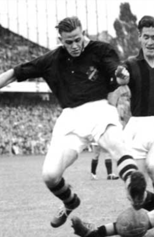 Ivan Bodin en 1950